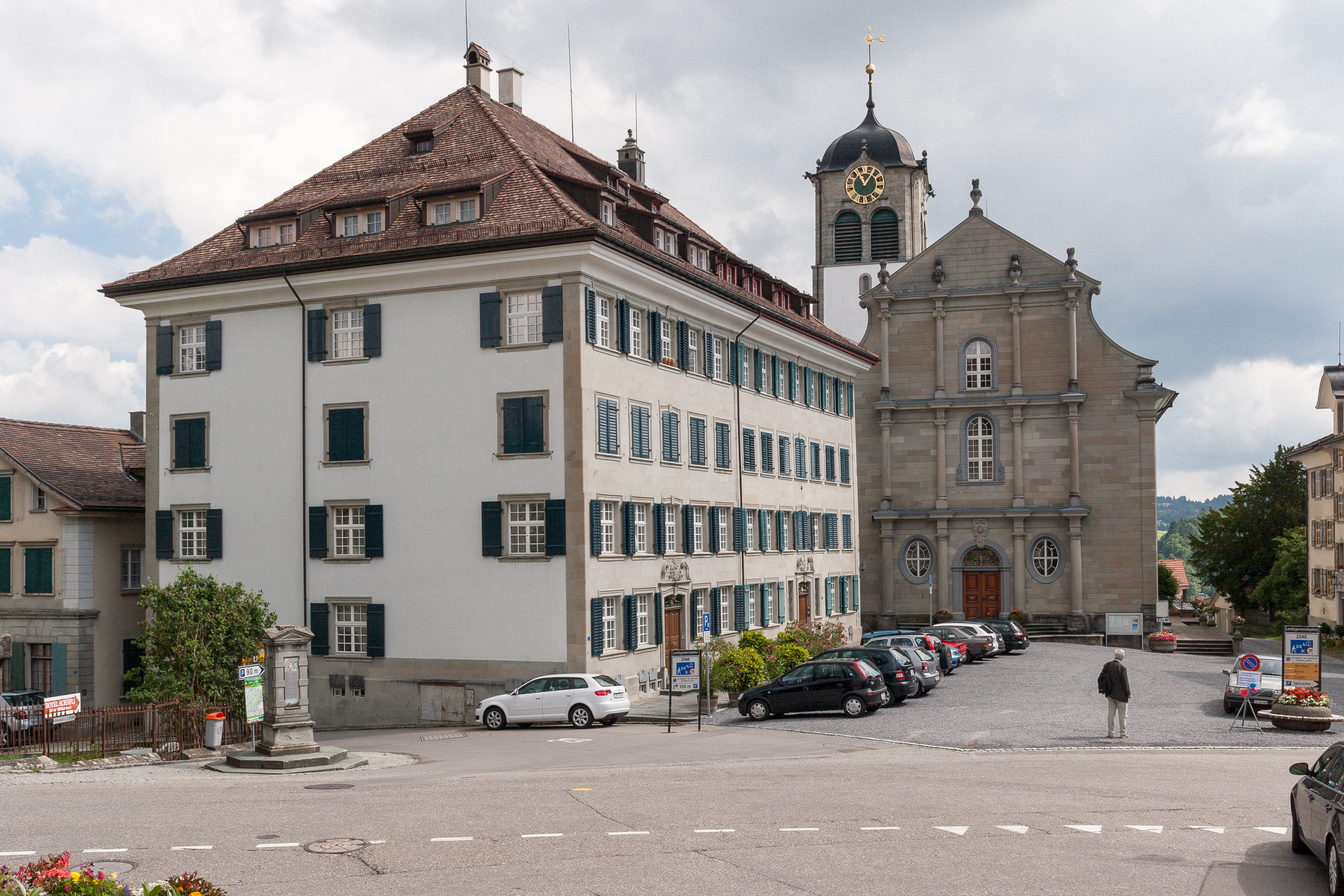 Landsgemeindeplatz mit Zellweger'schem Doppelpalast (ab 1747) und Reformierter Kirche (1779 - 1782)